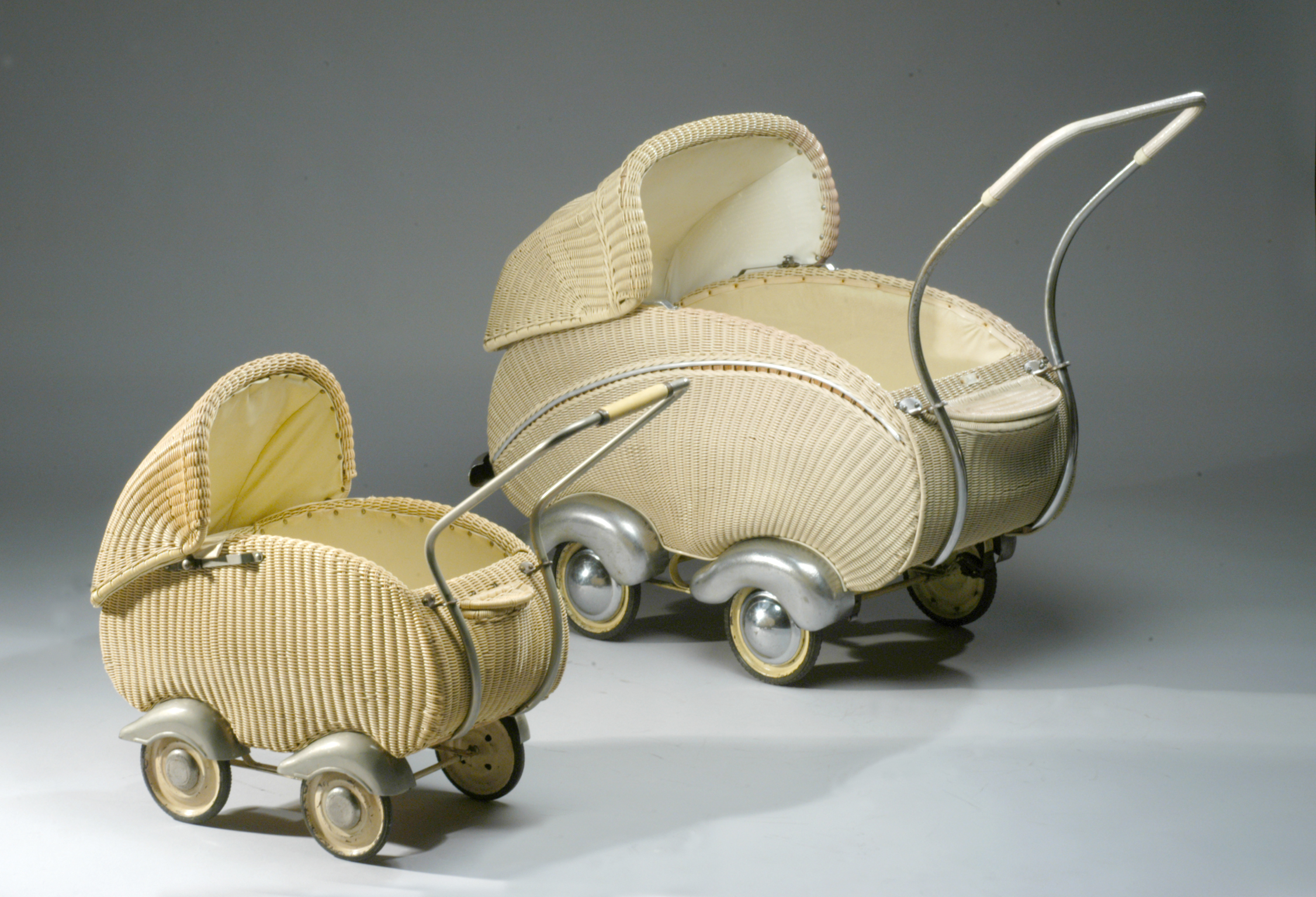 Kinderwagen, Firma Hecker, 1950er Jahre, Kunststoffgeflecht, Metall, Holz, Gummi, 90 x 126 x 53 cm, WIM 2001/392 Puppenwagen, 1950er Jahre, Kunststoffgeflecht, Metall, Holz, Gummi, 65,5 x 83 x 34 cm, WIM 1985/839 LWL-Industriemuseum, Westfälisches Landesmuseum für Industriekultur, Dortmund; Foto/Copyright: Martin Holtappels / LWL-Industriemuseum, Dortmund, 2004